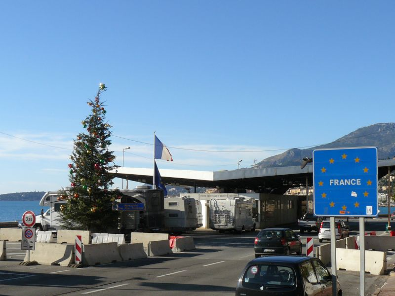 La D6327 à son début en France, à la frontière italienne, au pont Saint-Ludovic